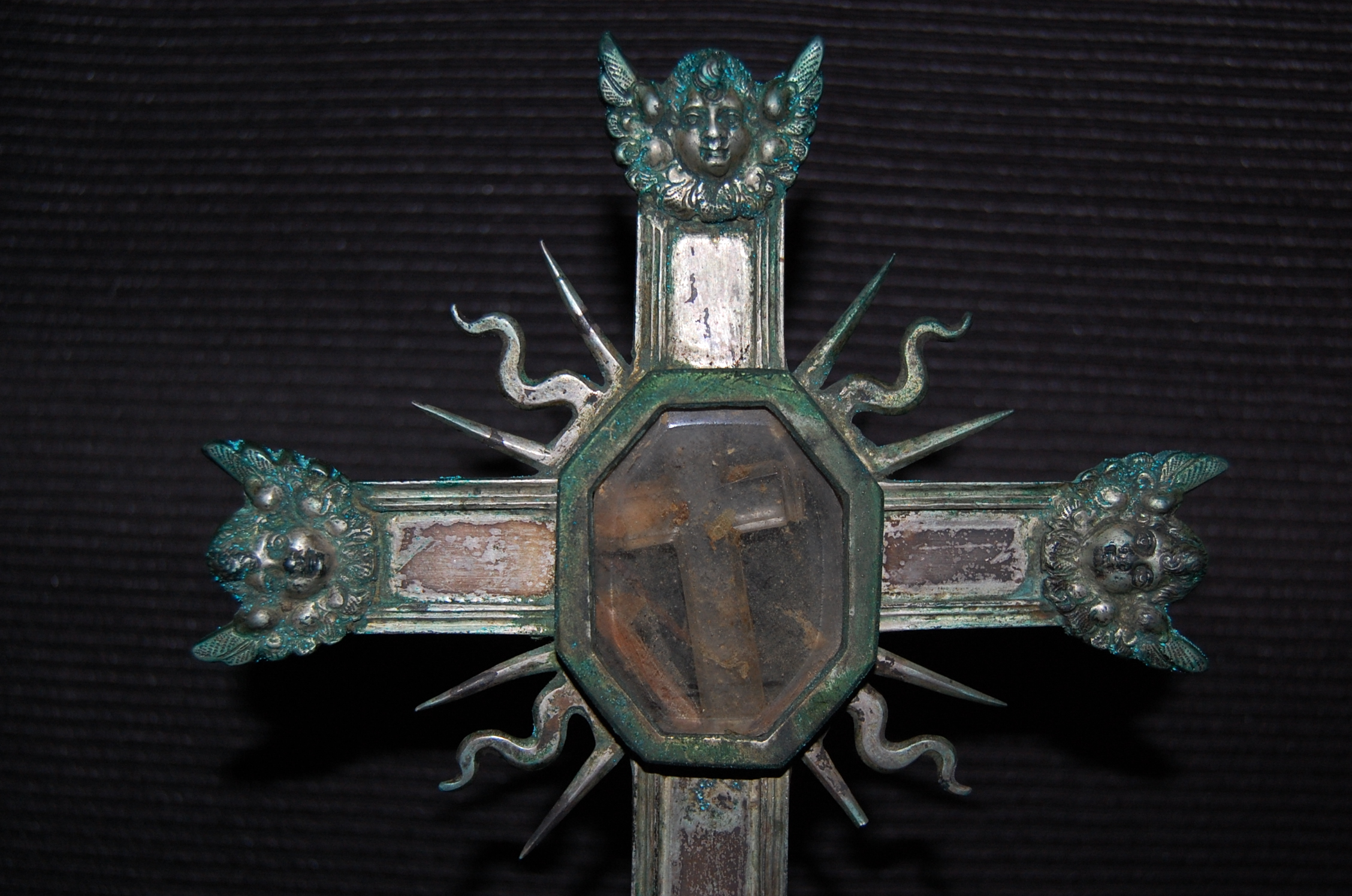 Stauroteca appartenente al patrimonio della Chiesa Madre Ex Cattedrale Santa Maria la Cava e Sant'Alfio in Lentini (Sr). Croce in rame dorato sbalzato del XVI secolo Fusto in rame casellato del XVI secolo All'interno il frammento della Vera Croce di Cristo